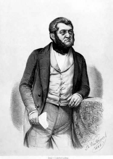 Georg von Vincke (Lthographie 1848)